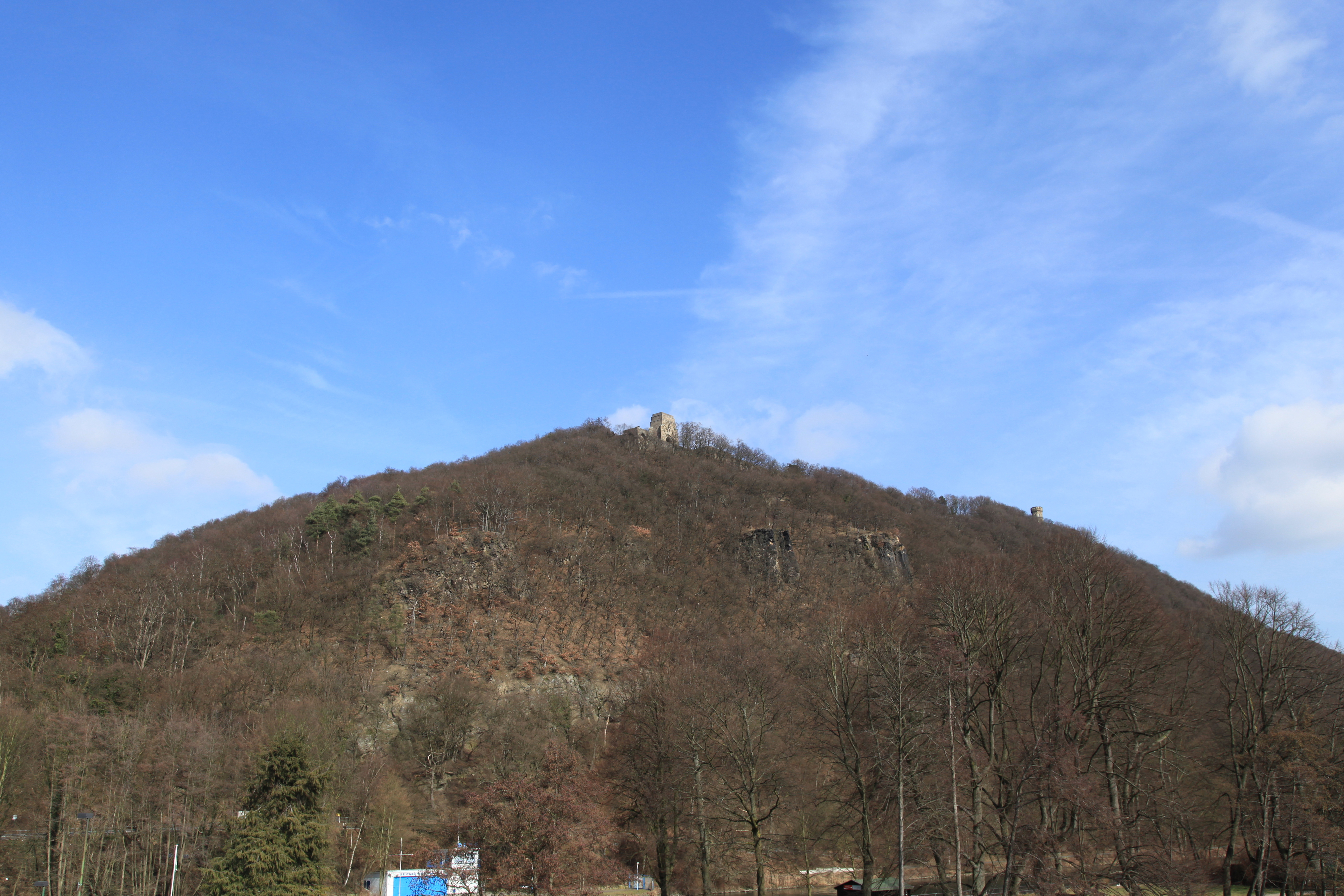 Blick von der Ruhrbrücke der Dortmunder Straße in Hagen auf den Syberg in Dortmund-Syburg; NSG Ruhrsteilhänge Hohensyburg